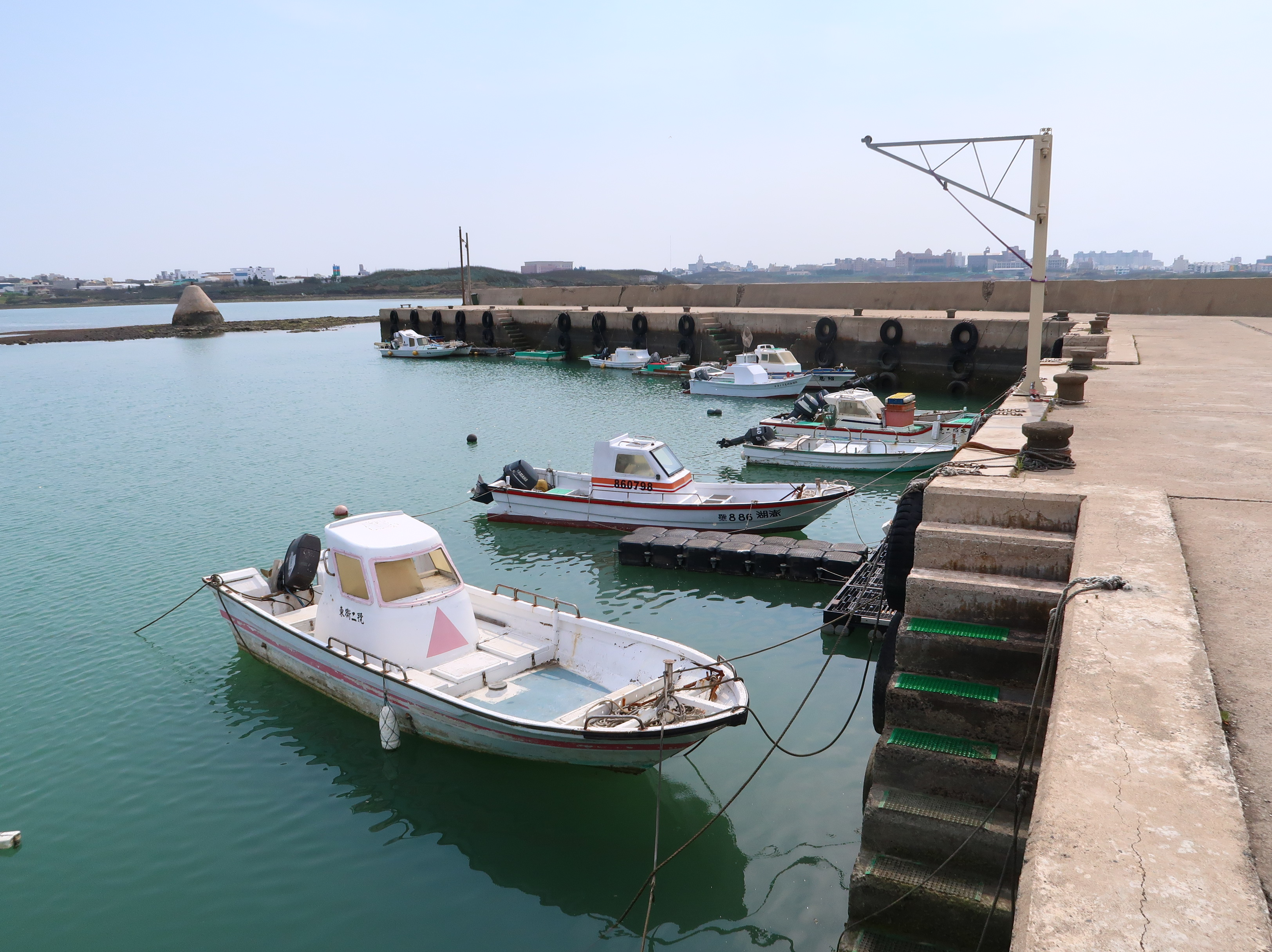 臺灣澎湖縣馬公市安宅里的漁港